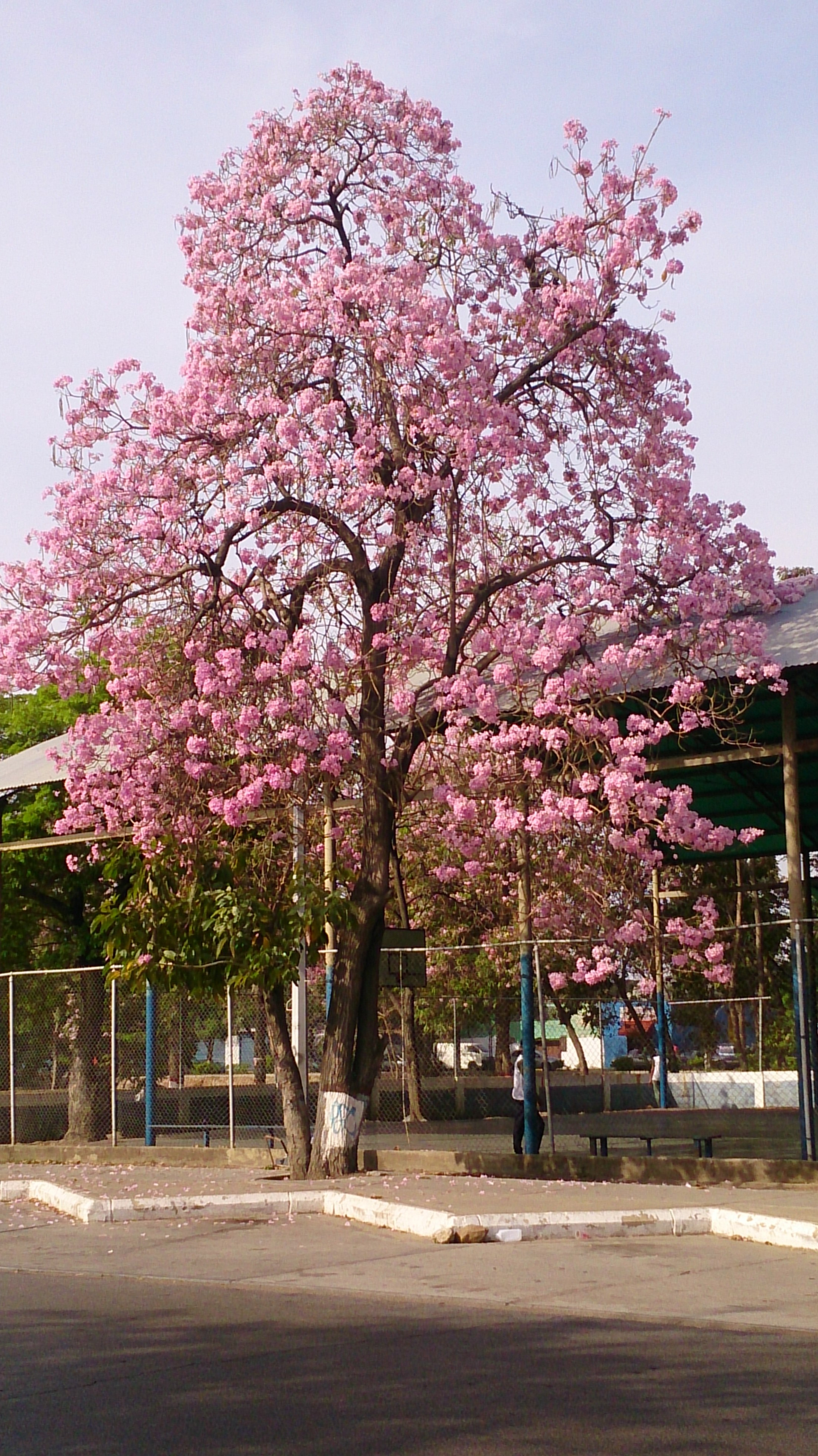 Árbol de Apamate completamente floreado en las riveras del Río Neverí en Barcelona, Estado Anzoátegui, Venezuela